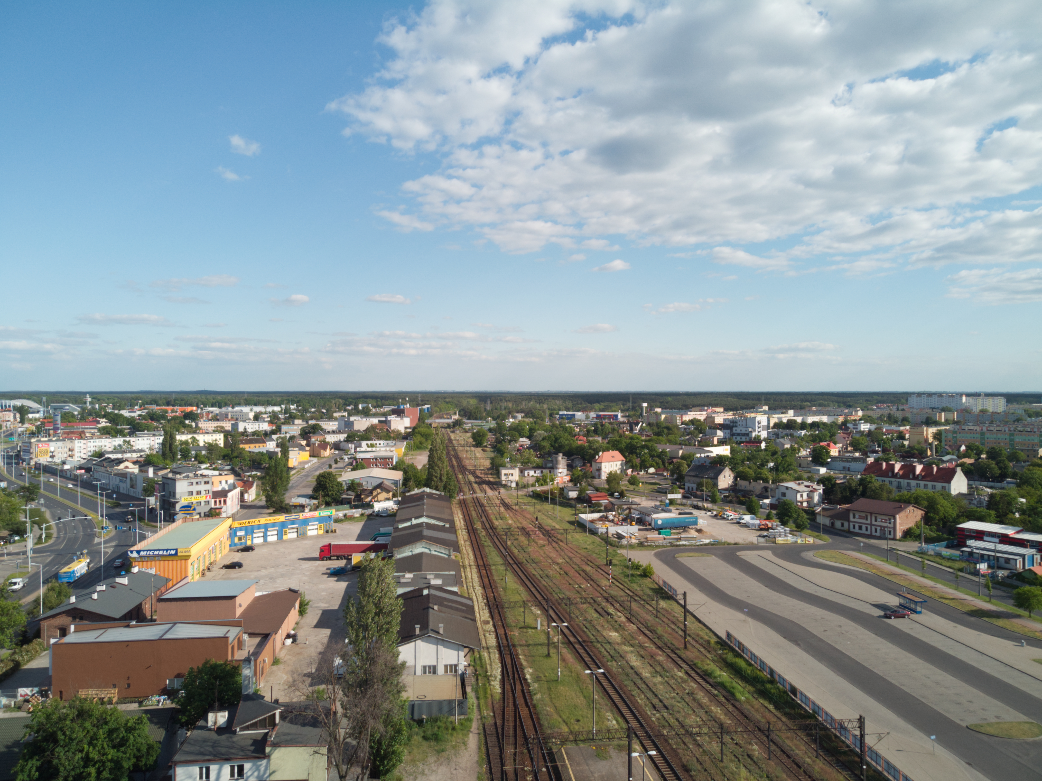 Styk Śródmieścia z Południem (2020 r.)